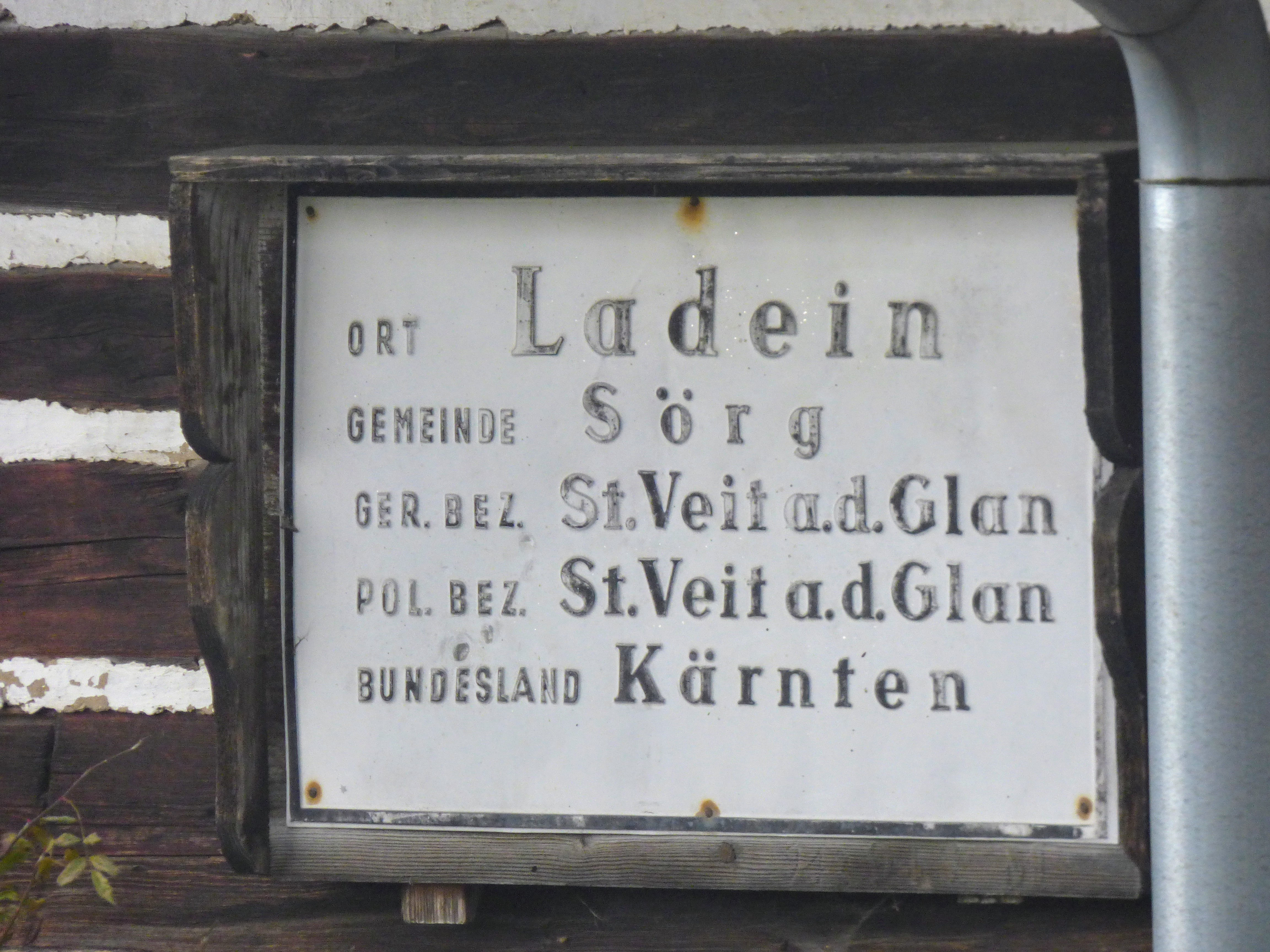 Ortschaftstafel Ladein, damals Gemeinde Sörg, heute Gemeinde Liebenfels